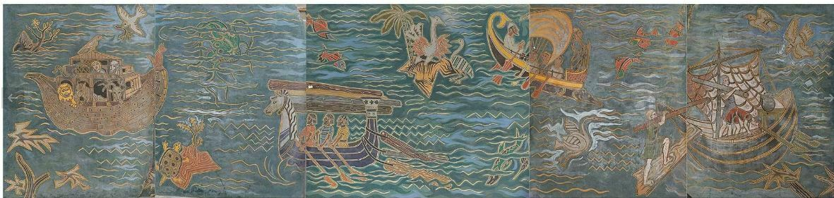 Elie GREKOFF (1914-1985) et Pierre MONTERET " cartons sur isorel du temple du bois". Technique mixte sur panneaux. Accidents et manques. Ensemble de panneaux réalisés Albert Charles, importateur de bois coloniaux, Exposition Internationale de Lyon en 1951. Grekoff y exécuta quatre grandes verrières en verre peint et en collaboration avec le peintre Pierre Monteret, une vaste fresque de cent mètres carré relatant l'histoire du transport des bois coloniaux à travers les âges.